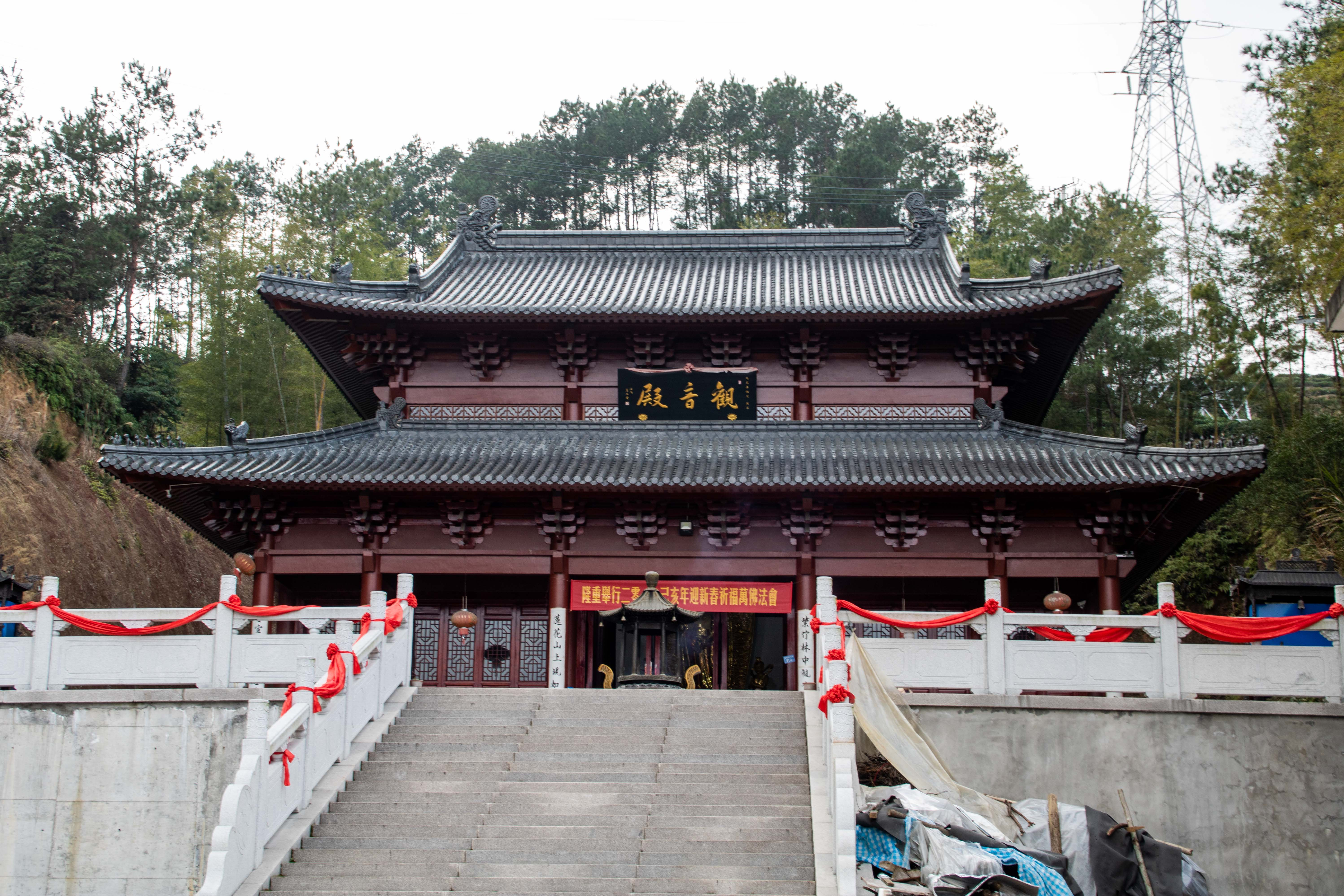 中文（中国大陆）: 寿宁县南阳镇的一处庙宇